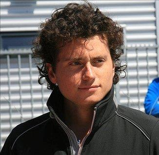 Luca Ludwig 2010 in Assen